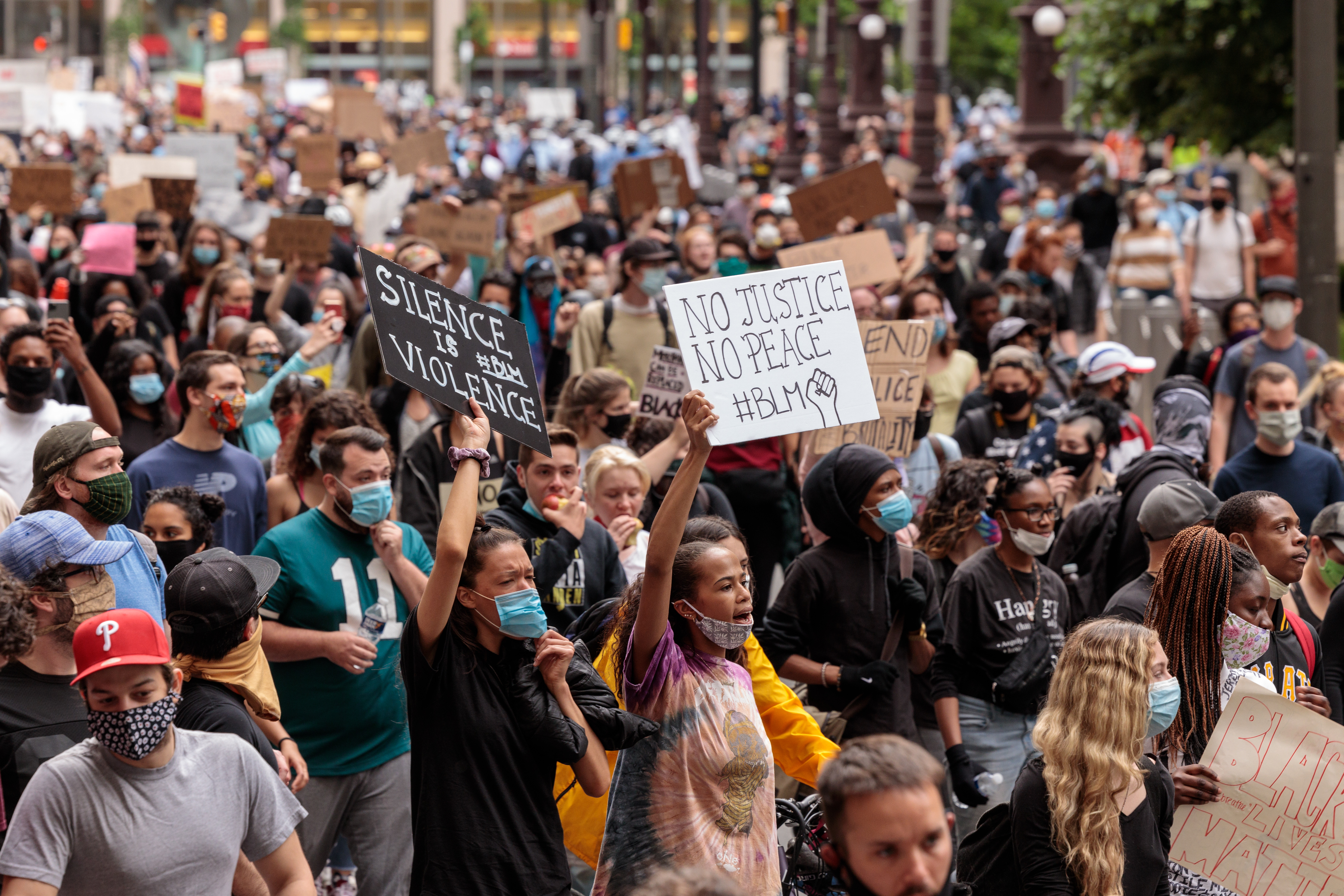 Civil Unrest 2020